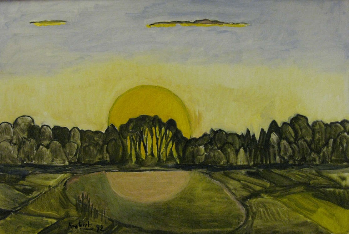 „Untergehende Sonne“ von Hans Neubert (1992, Öl auf Leinwand, 80 x 120 cm)